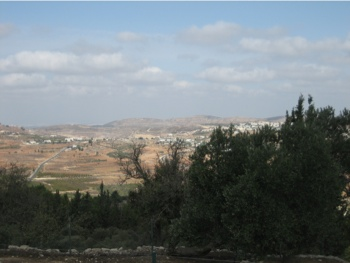 A view from Nabi Samuil towards north: area of the Tribe of Ephraim. / Pogled s juga prema području plemena Efrajim i Efrajimskom gorju.